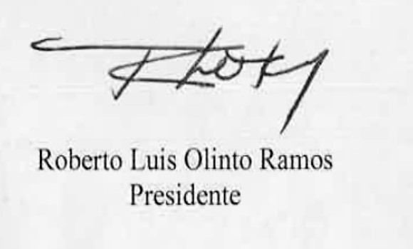 Assinatura de Roberto Olinto, presidente do IBGE em um documento público.